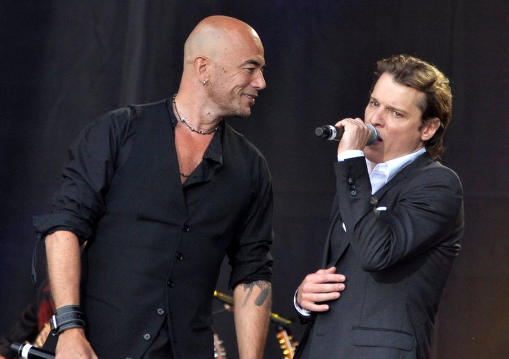 Pascal Obispo et Bénabar au concert pour l'égalité de SOS racisme